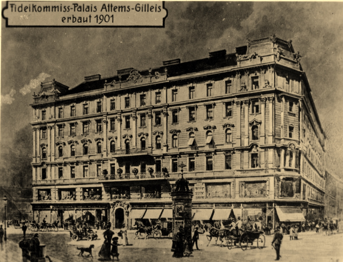 Fideikommisspalais Attems-Gilleis; erbaut von Graf Maximilian Attems-Gilleis; 1010 Wien, Stallburggasse 4